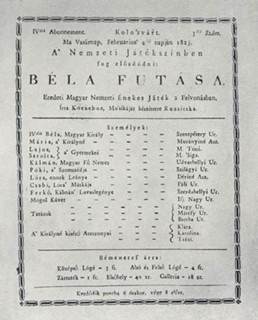 Ruzitska József: Béla futása. Az első magyar történelmi opera színlapja. A kolozsvári ősbemutató napja 1822. december 26.